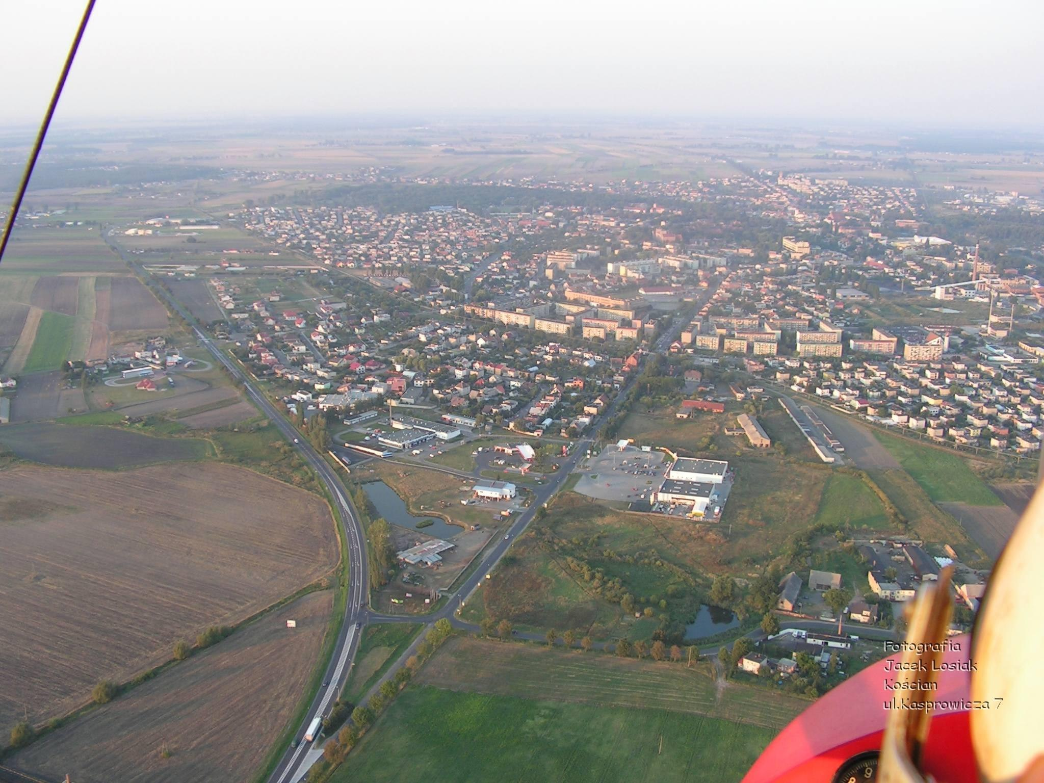 Widok na Kościan z motolotni